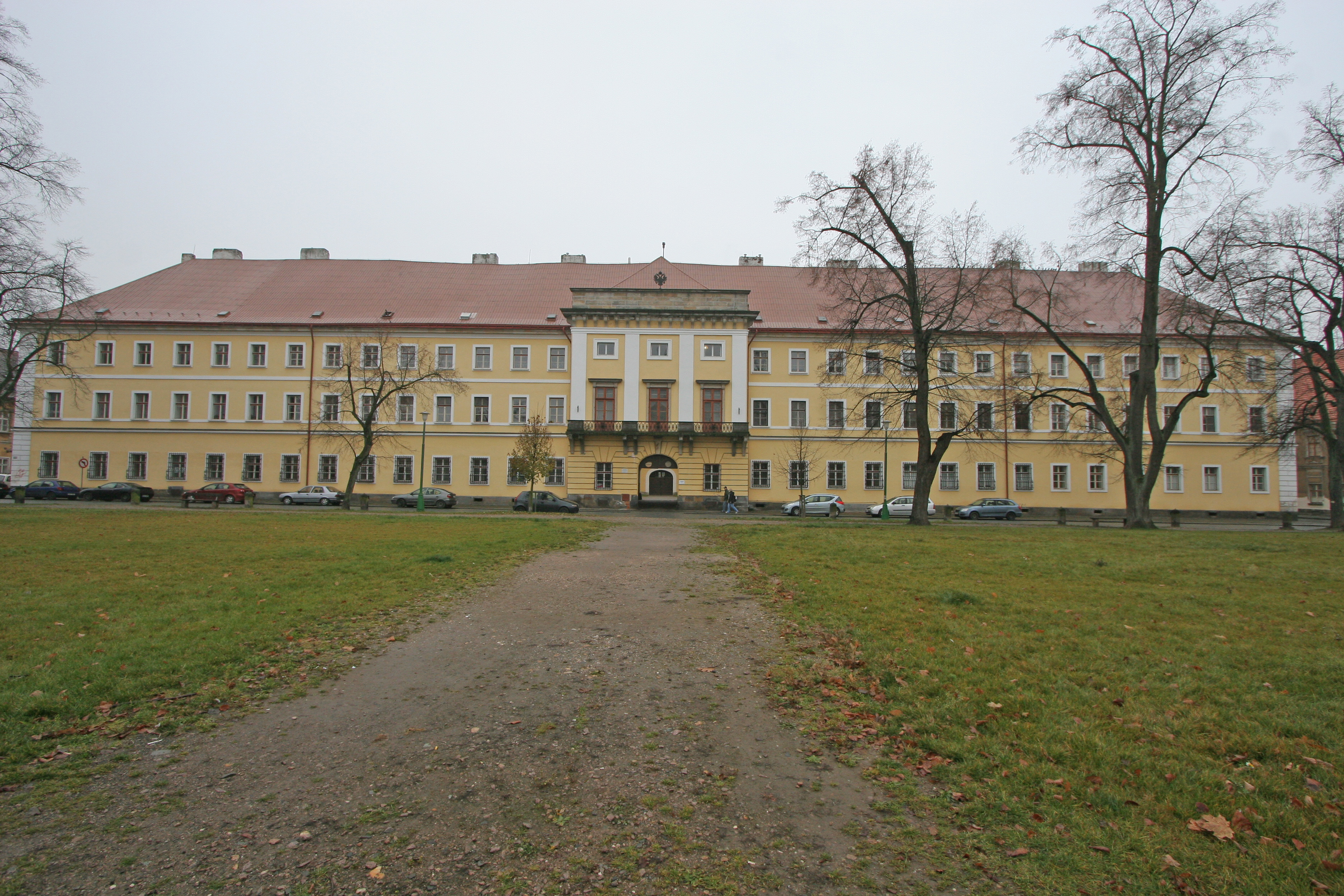 Kasárna - velitelství (Josefov), Masarykovo nám. 1, Josefov